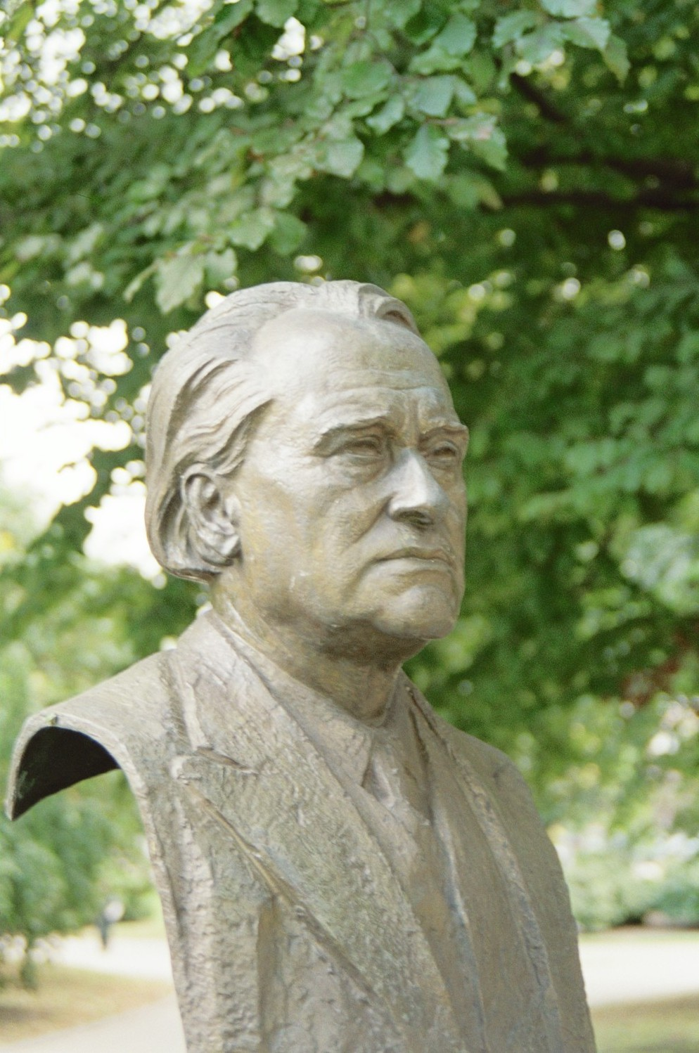 Pierre Paulus - buste en bronze, anciennement dans le parc Reine Astrid à Charleroi (Belgique). Le buste a été volé pour son métal à une date indéterminée. Sculpture d'Alphonse Darville (1910-1990).